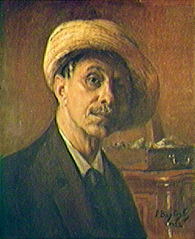 O Paisagista (Auto-retrato)